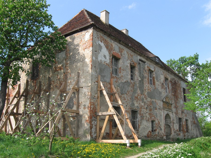 Przybyszów, dwór